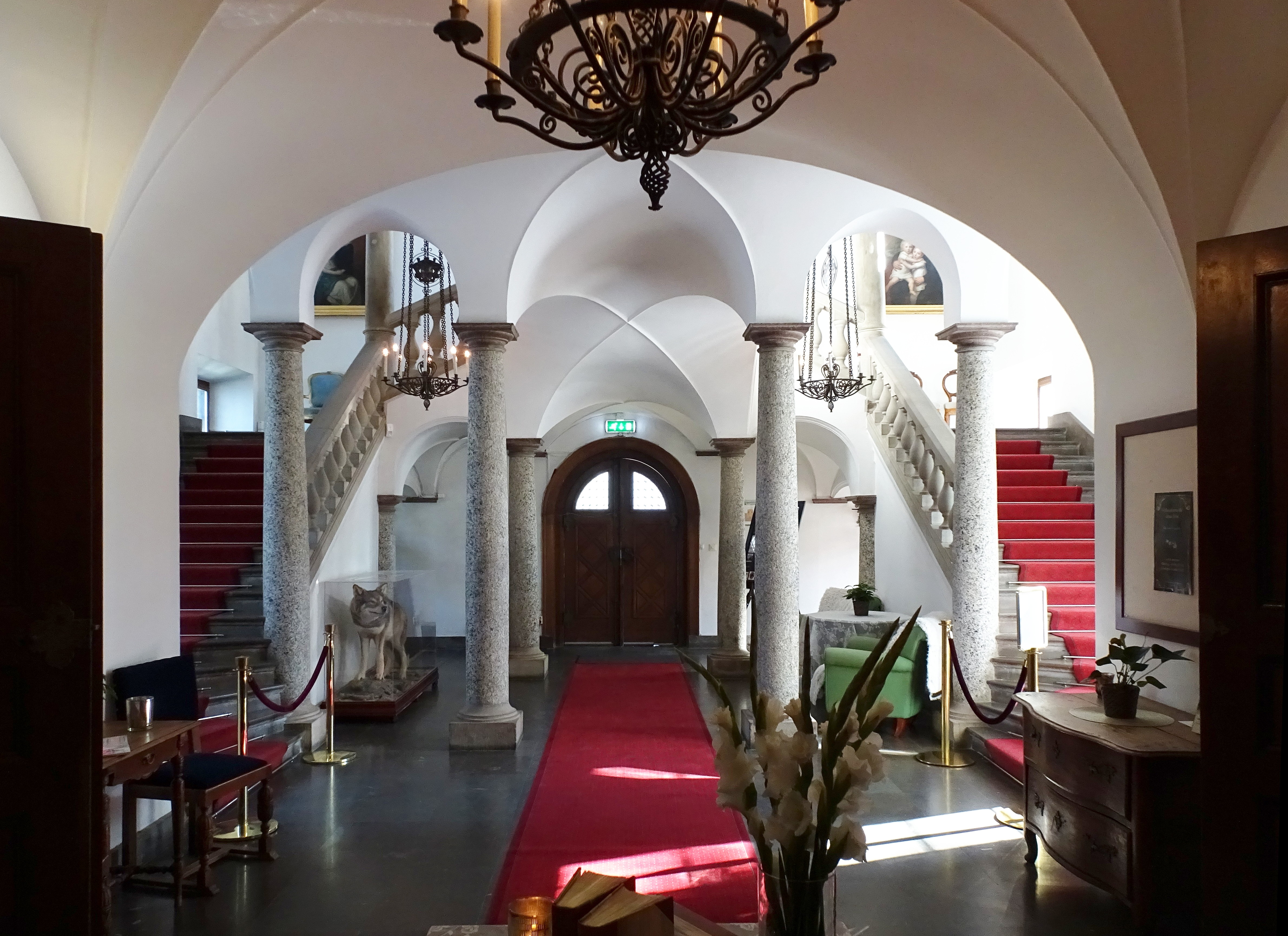 Årsta slott interiör, trapphall, bottenvån.